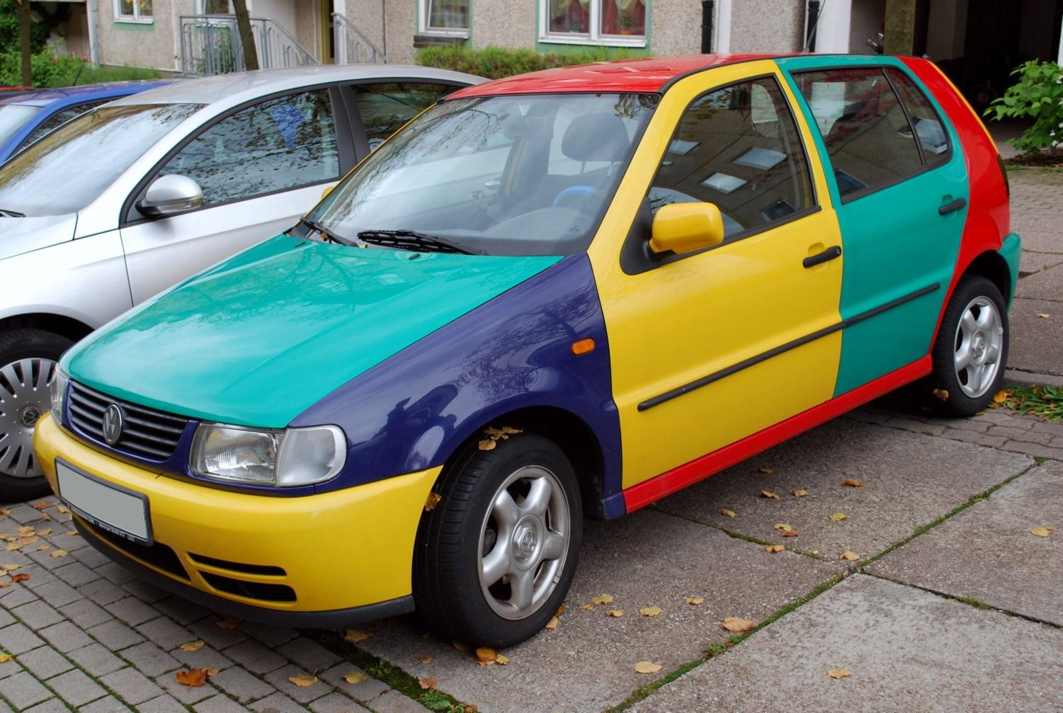 VW Polo III